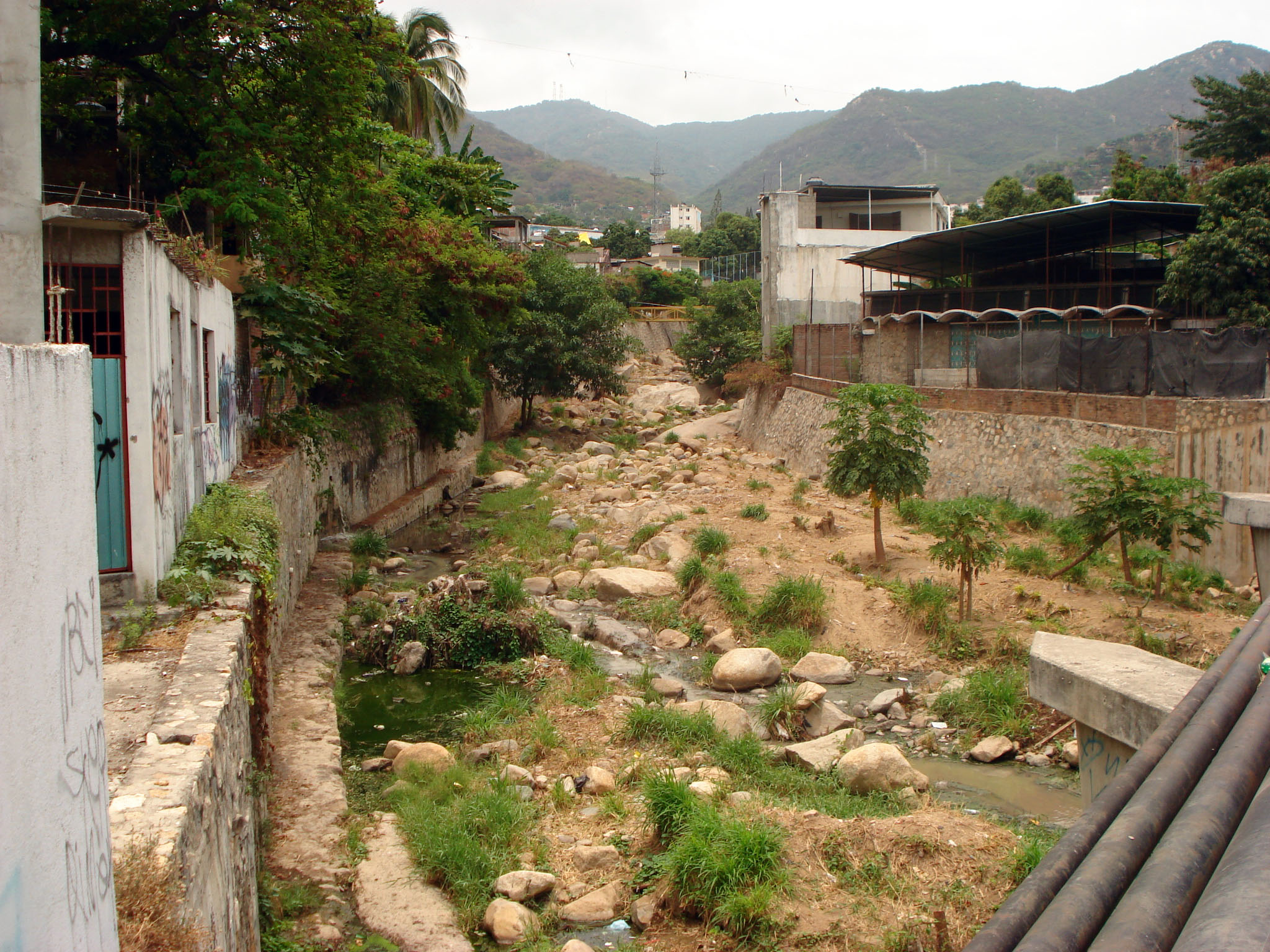 Cauce del río del Camarón visto desde el puente que lo cruza en la Avenida Constituyentes, ubicada en la parte alta de la ciudad y puerto de Acapulco, Guerrero, México. AL fondo, el cerro del Veladero donde tiene origen esta corriente hídrica.